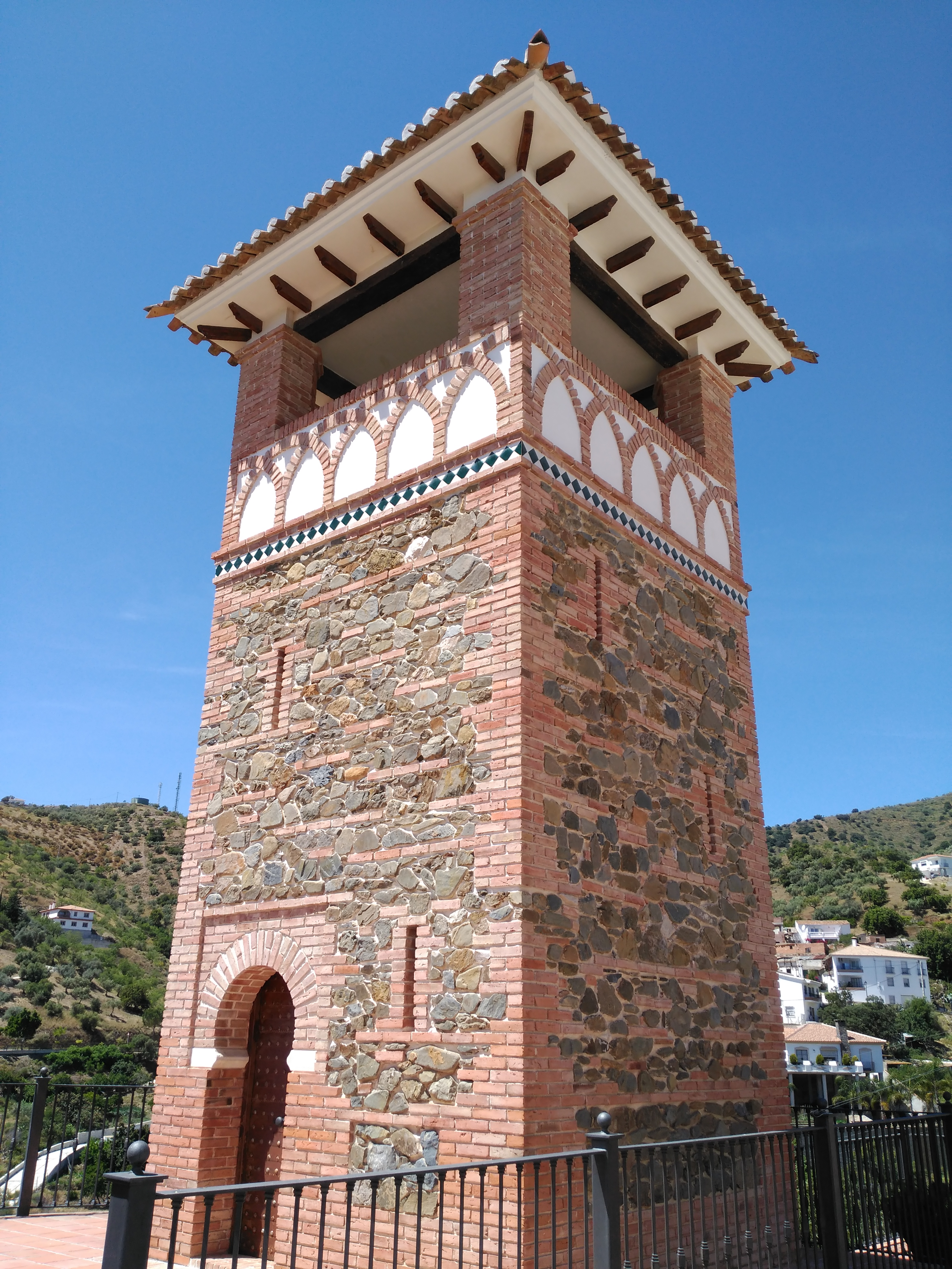 Torre del Violín de Totalán (Málaga).